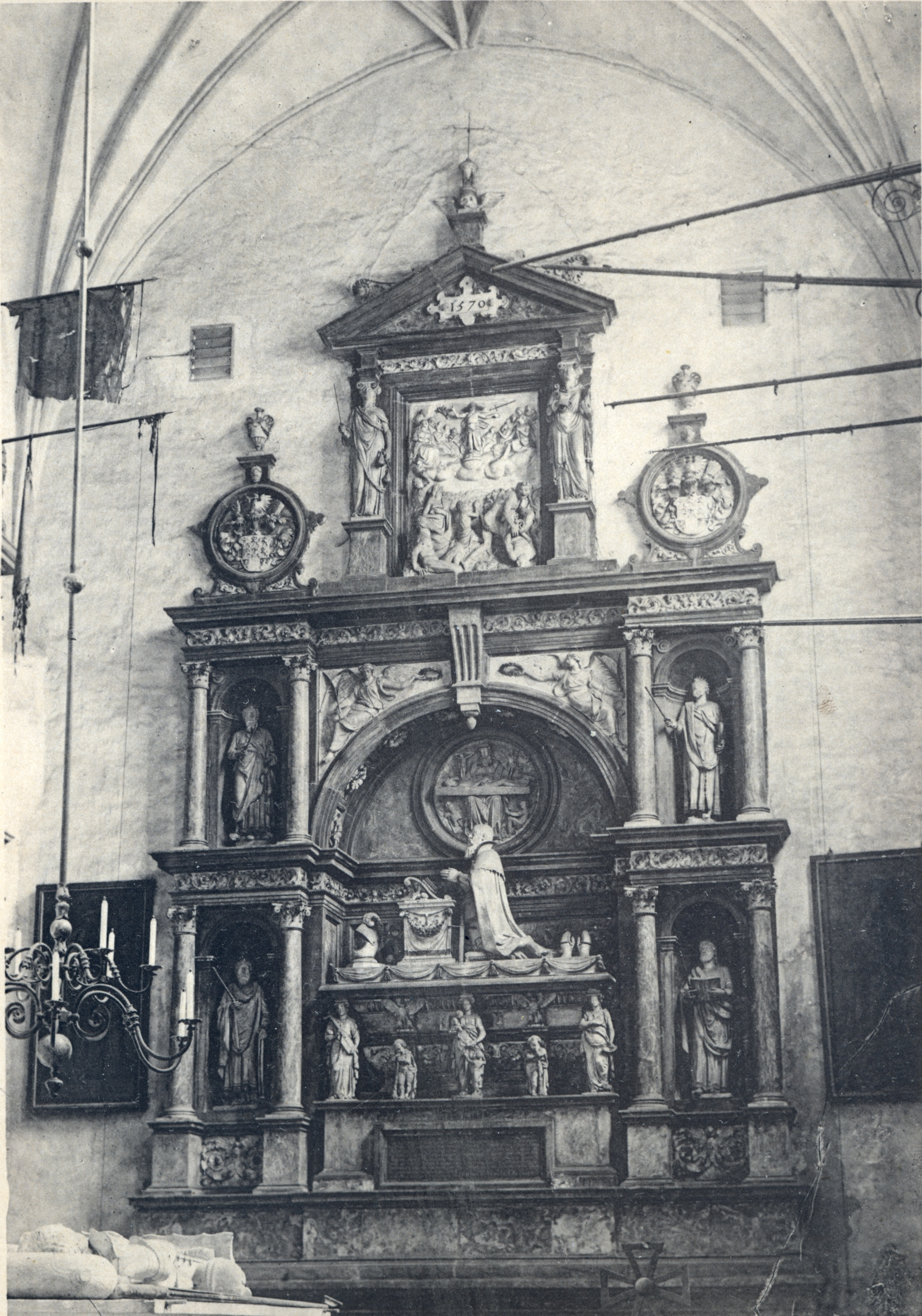 Königsberg, Herzog Albrecht I, Grabdenkmal im Dom